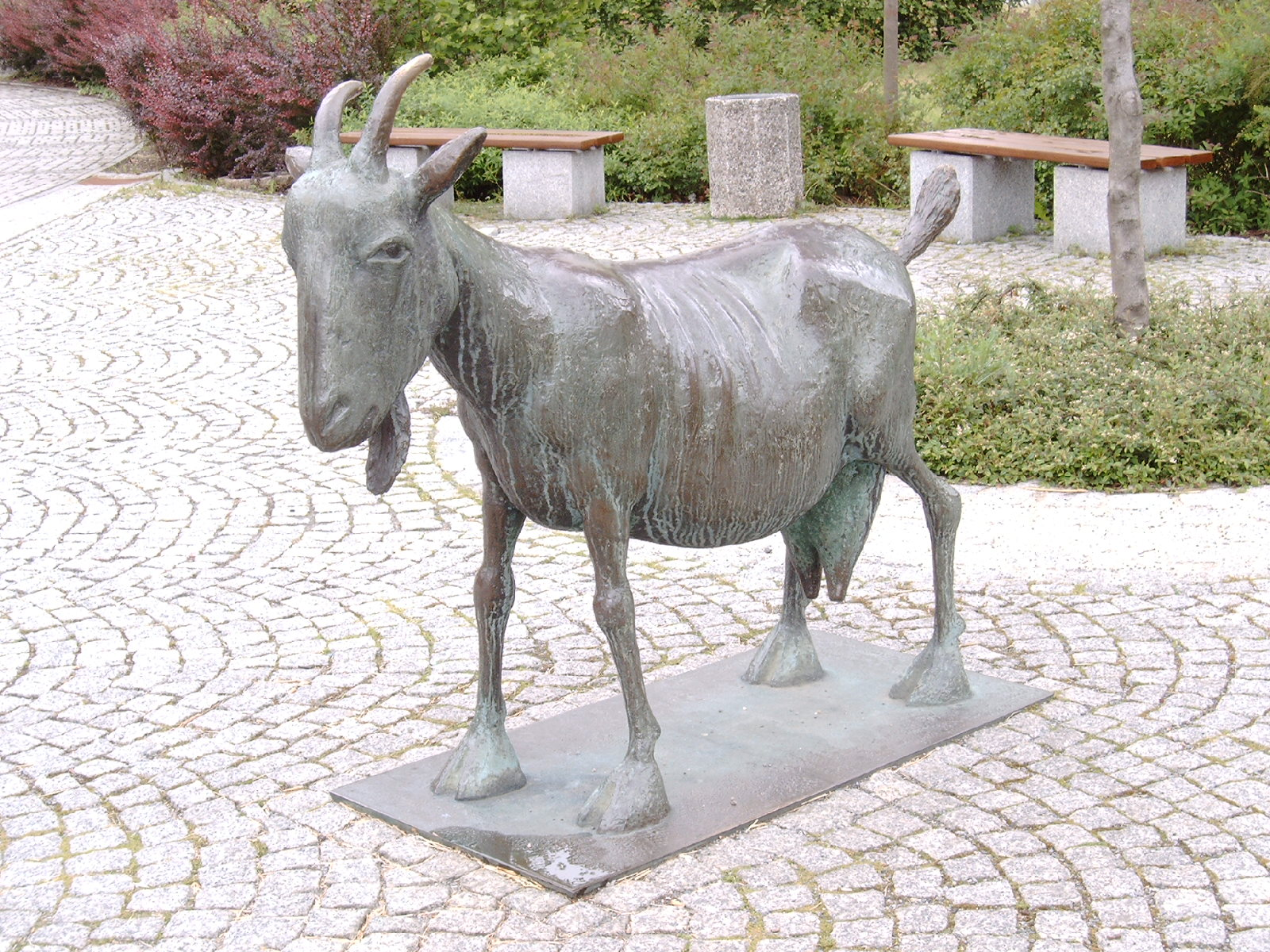 Die Skulptur der Neustädter Ziege von Neustadt in Sachsen